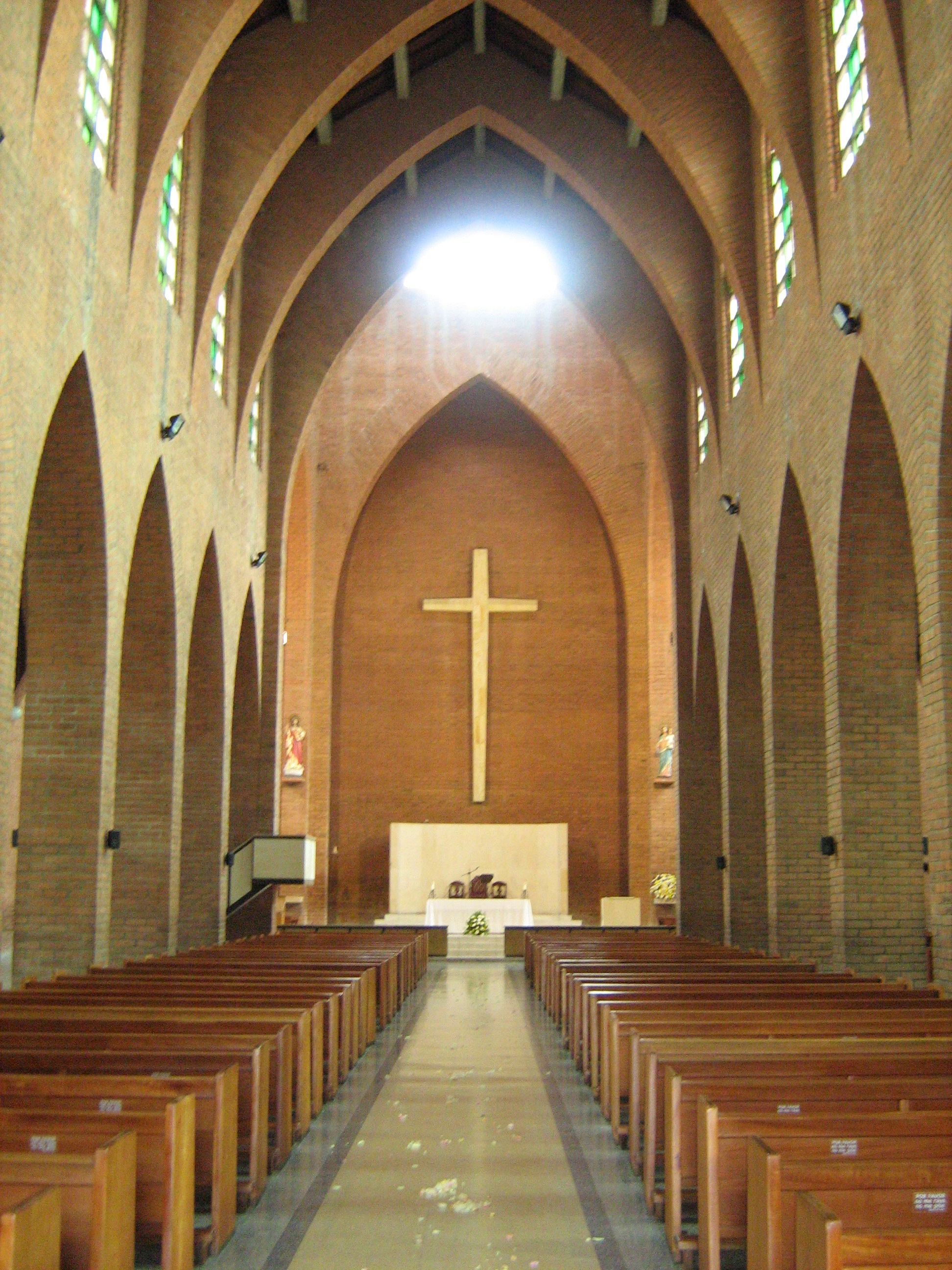 iglesia San José en Envigado. Antioquia. Colombia